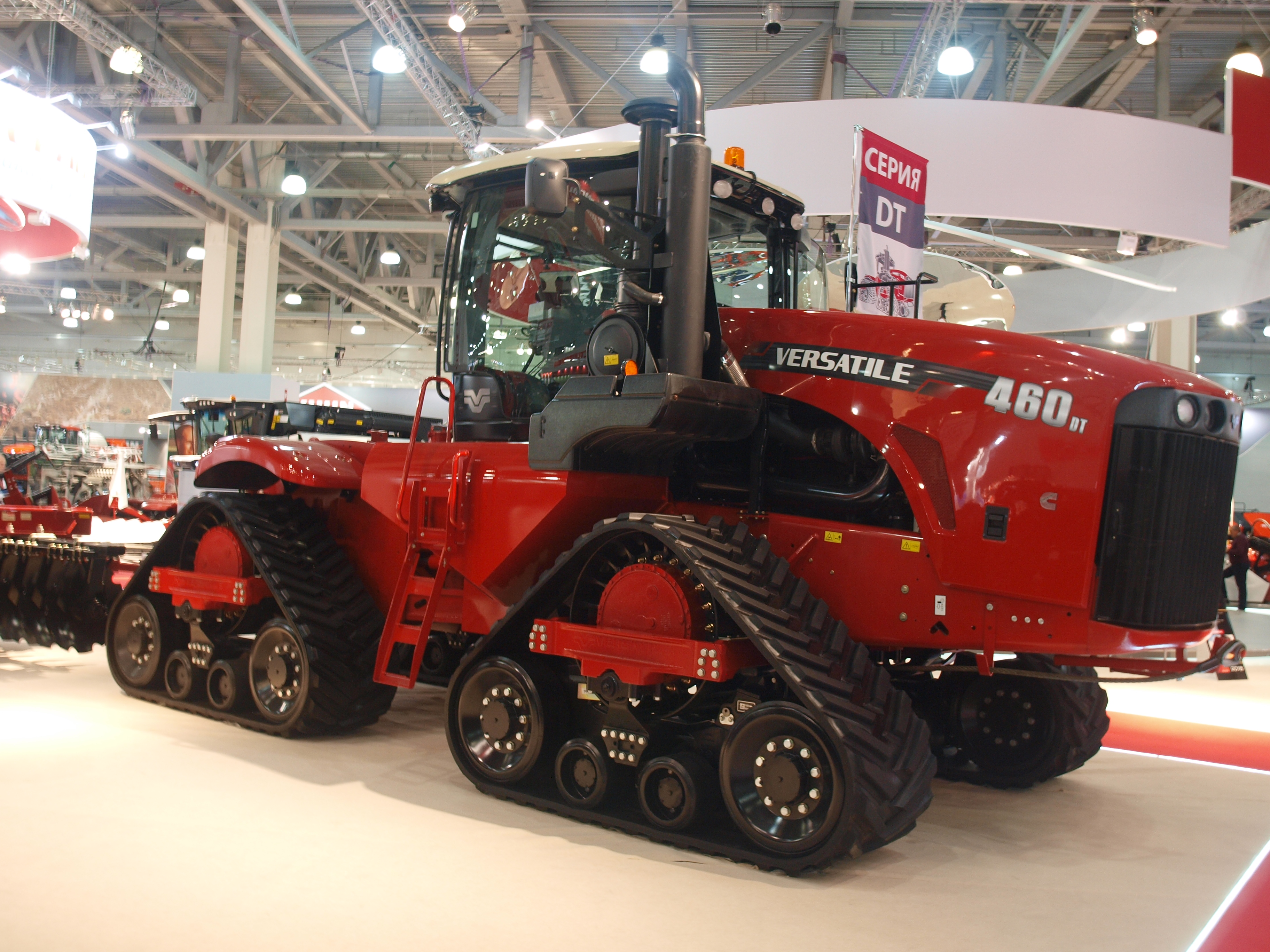 Крокус Экспо.10.10.2018